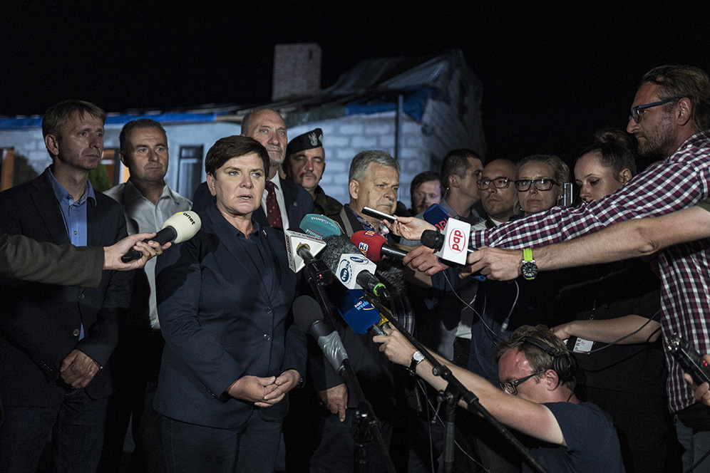 We wsi Rytel, którą odwiedziła premier Beata Szydło, nawałnice uszkodziły 150 domów. 70% gospodarstw wciąż pozostaje bez prądu. W usuwaniu skutków nawałnicy pomagają żołnierze oraz specjalny sprzęt wojskowy. Aktualnie w gminie Rytel przebywa 70 żołnierzy, którzy udrożniają koryto rzeki Brdy.